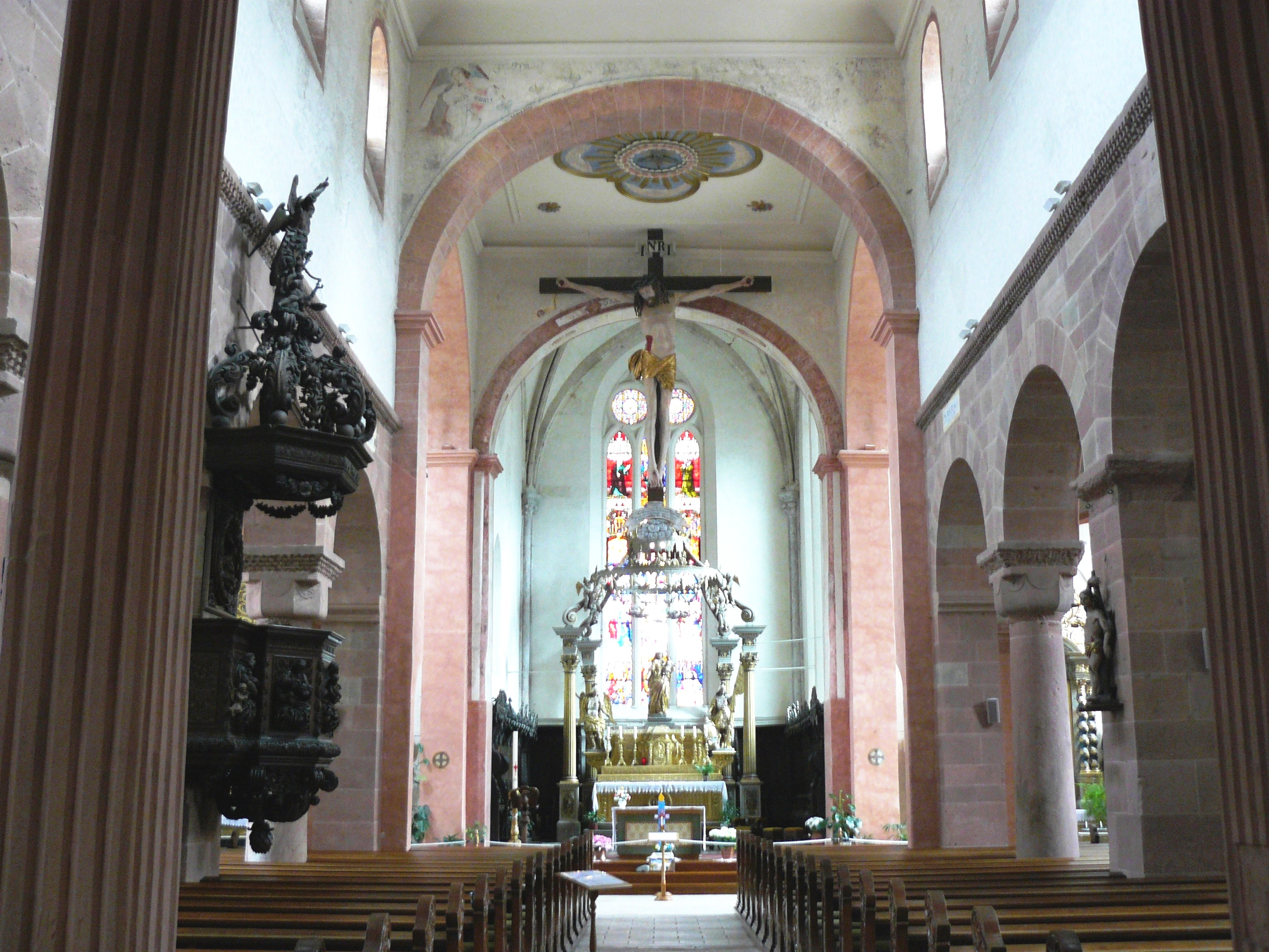 Lautenbach 089.JPG